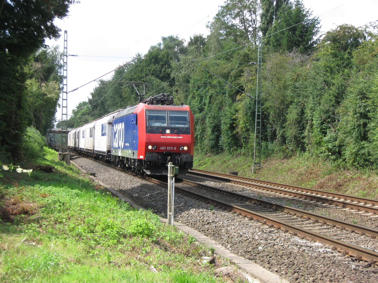 SBB Baureihe 482 mit Güterzug auf der Bahnstrecke Oberhausen-Osterfeld Süd–Hamm bei Recklinghausen Suderwich, Juli 2009